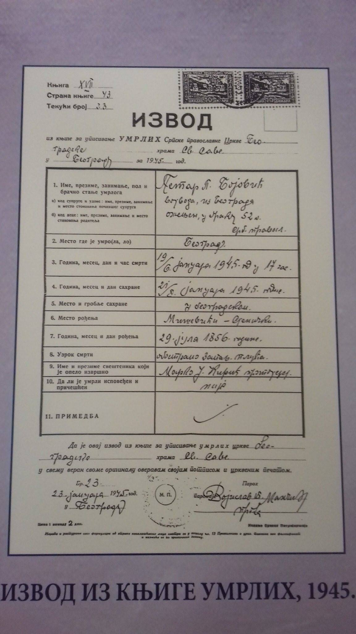 Srpskohrvatski / српскохрватски: Dokument slikan na izložbi, izvod iz maticne knjige umrlih na kojem se vidi da je vojvoda Petar Bojović umro od upale pluća